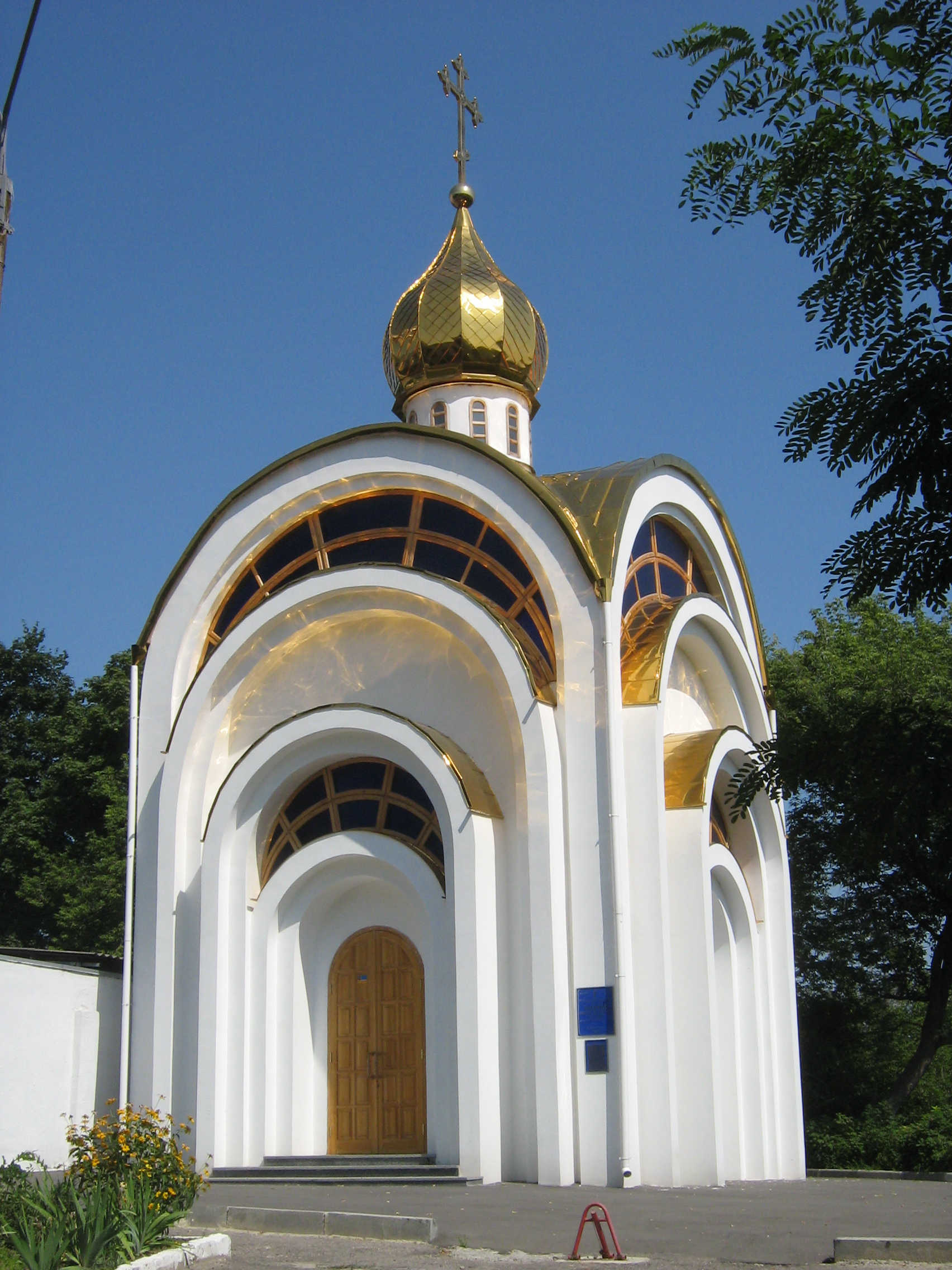 Часовня великомученицы Татьяны на улице Лермонтовской, 27. Построена Народной украинской академией.